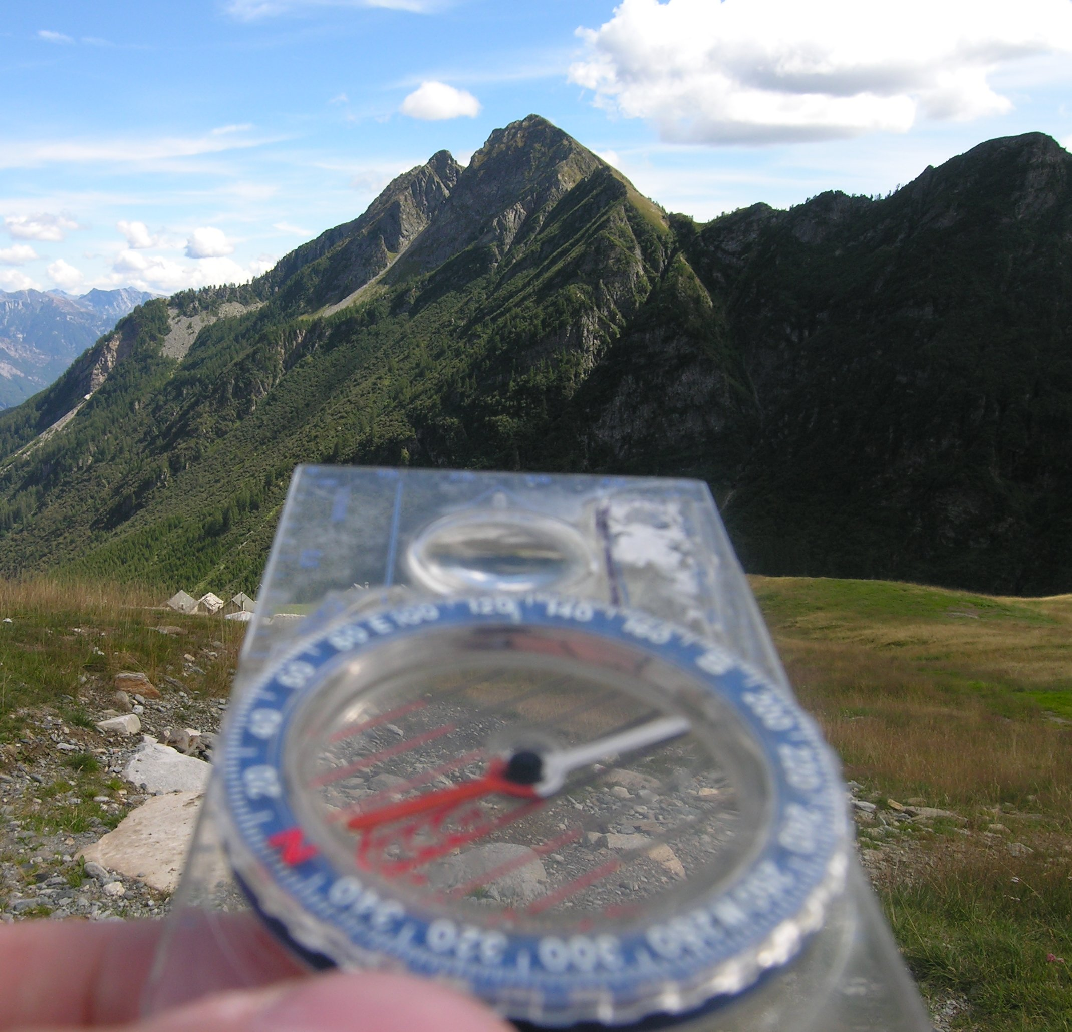 Compass usage illustration